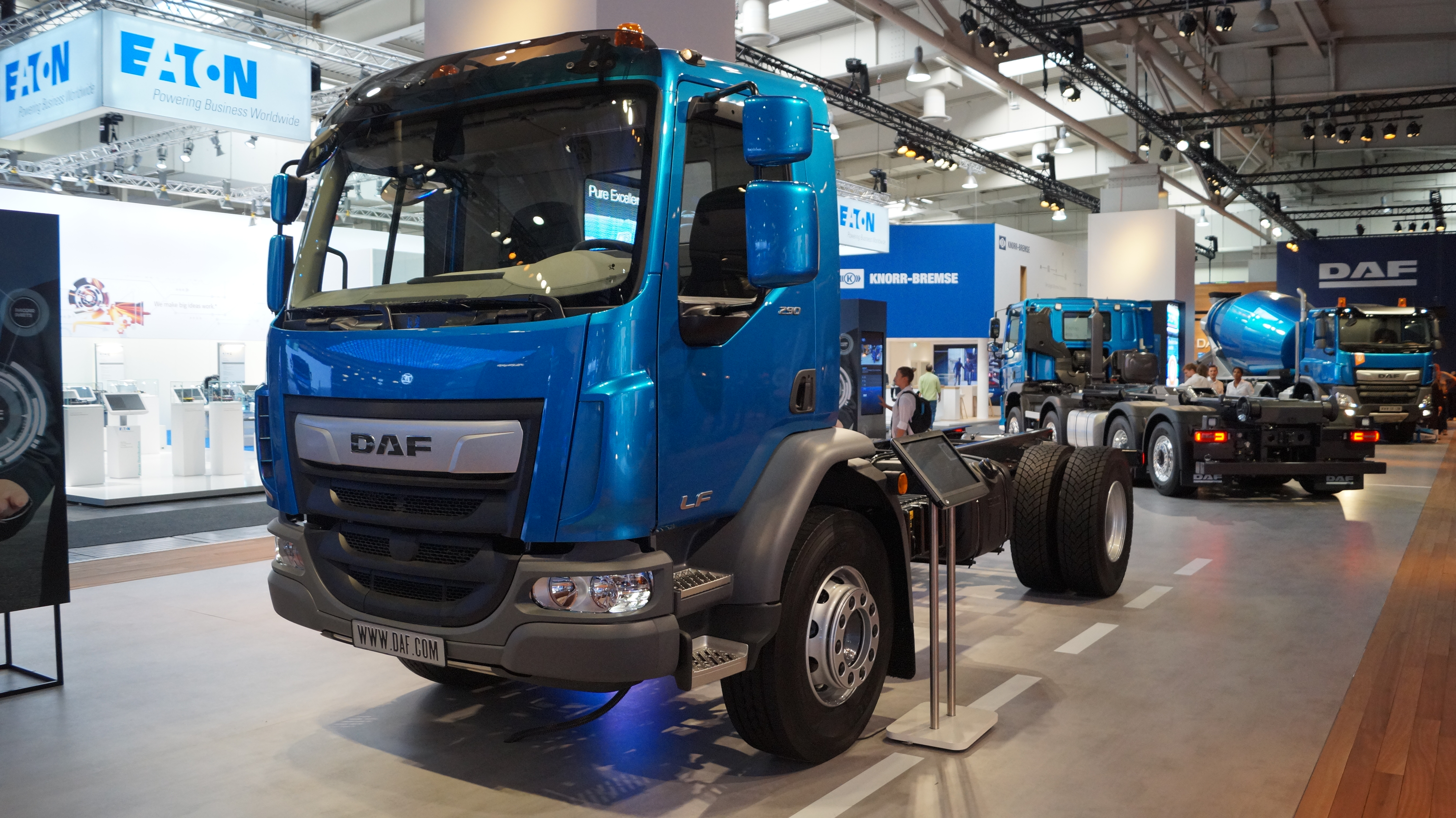 Schrägansicht der Front eines DAF LF 290 FA, ausgestellt auf der IAA 2018.